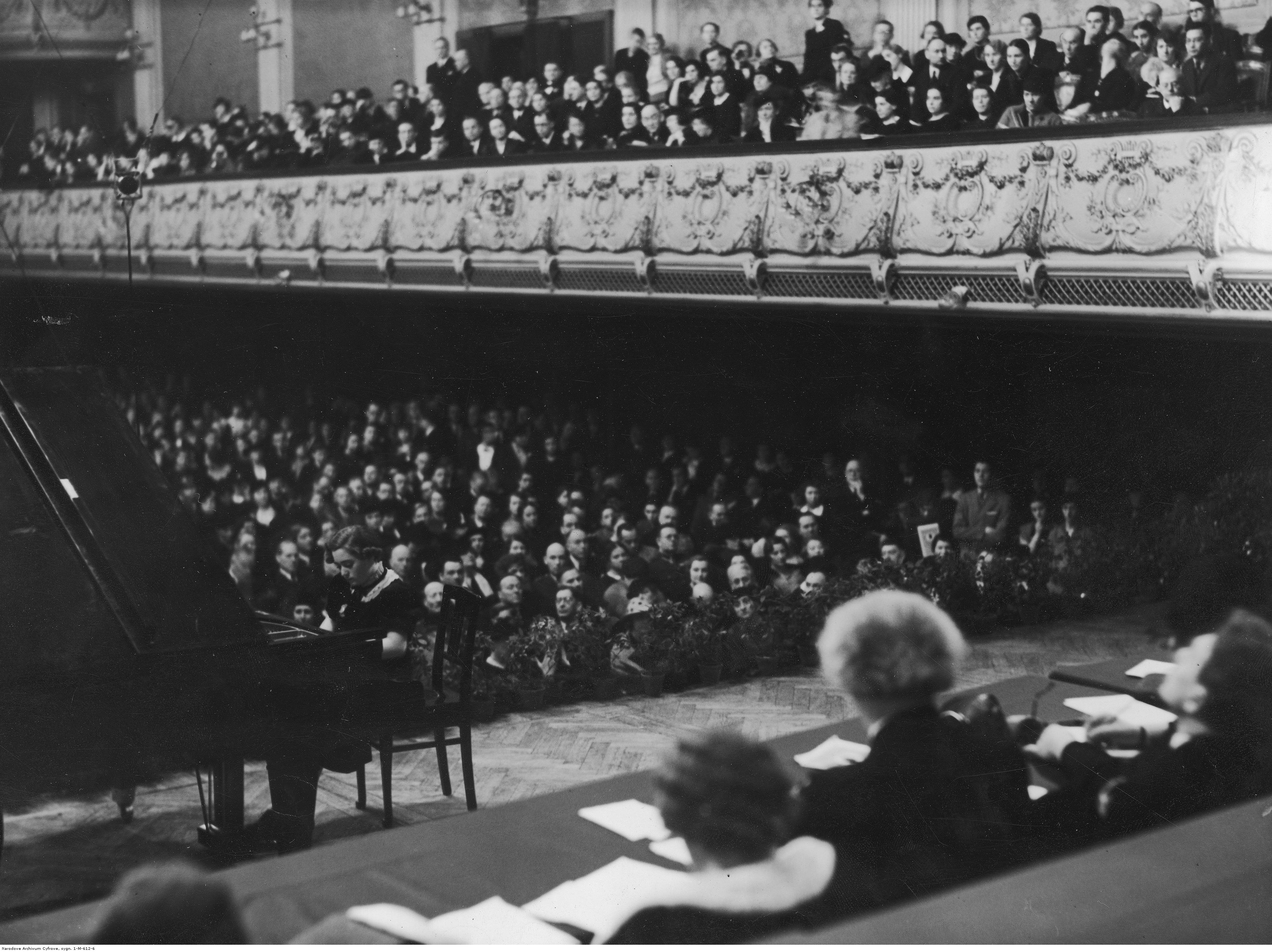 Pianistka W. Wächter (Austria) inaugurująca przesłuchania I etapu III Konkursu Chopinowskiego